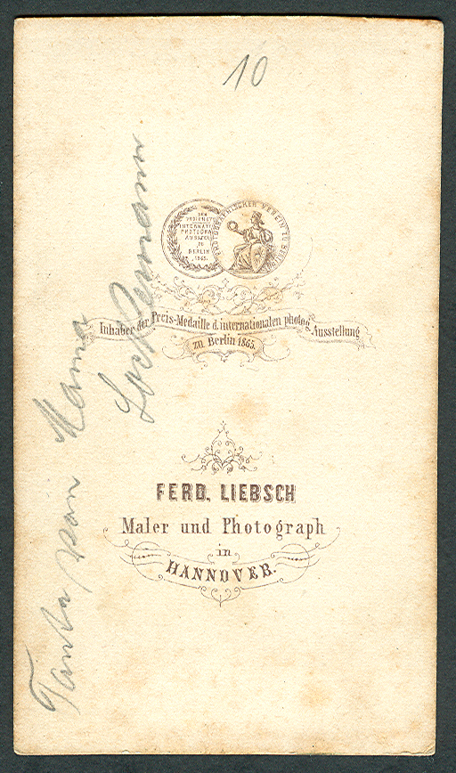 Mit der Rückseite der Carte de Visite war Ferdinand Liebsch als "Inhaber der Preis-Medaille d(er) internationalen photog(raphischen) Ausstellung zu Berlin 1865. Ganz oben eine Abbildung der Medaille mit der Umschrift "Photographischer Verein zu Berlin". Liebsch hat hier zwar keine genauere Adresse angegeben, aber immerhin seine Berufung als Maler und Fotograf in Hannover.